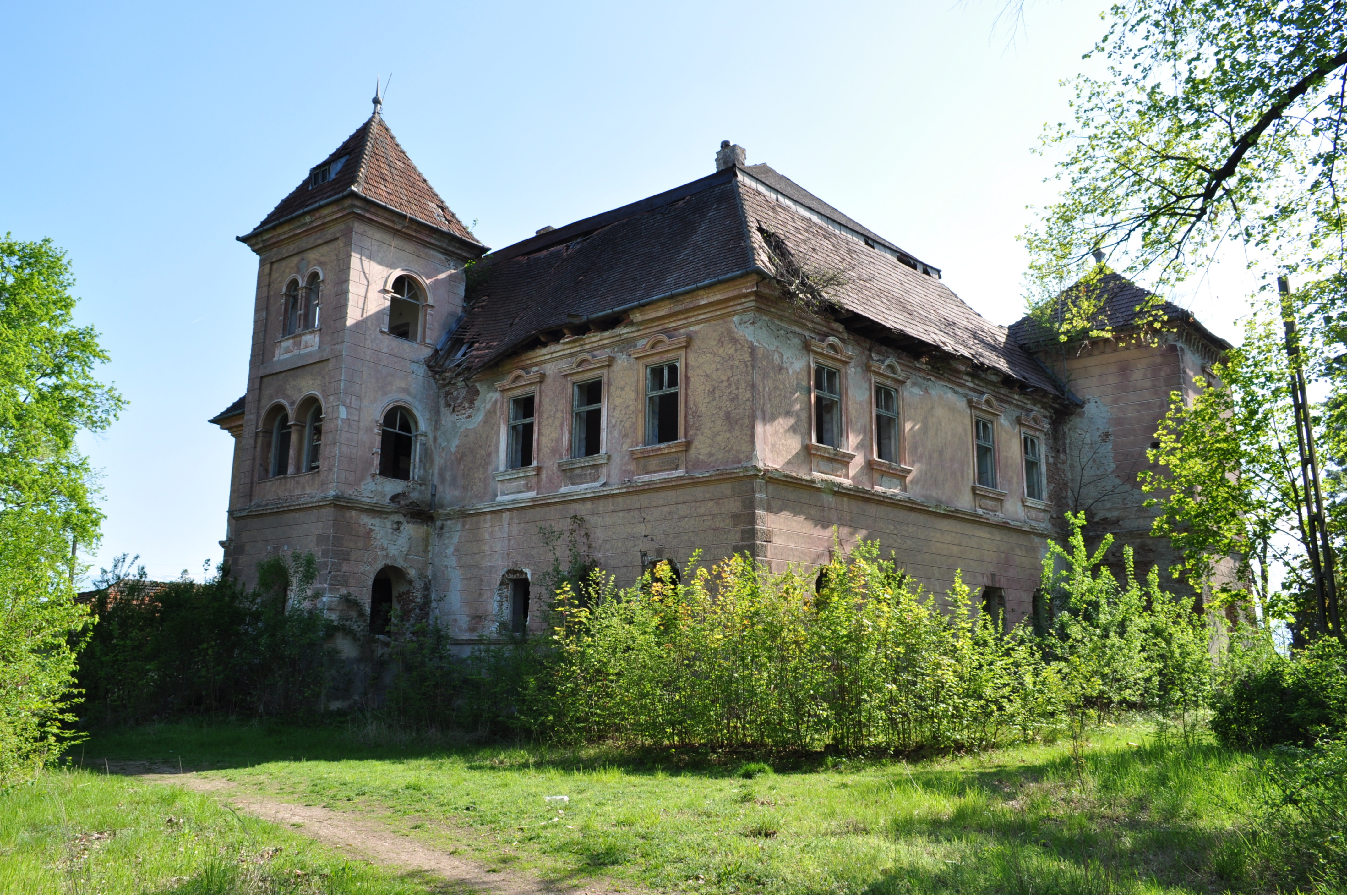 Ansamblul conacului Nalatzi-Fay, localitate componentă NĂLAŢVAD; oraş HAŢEG